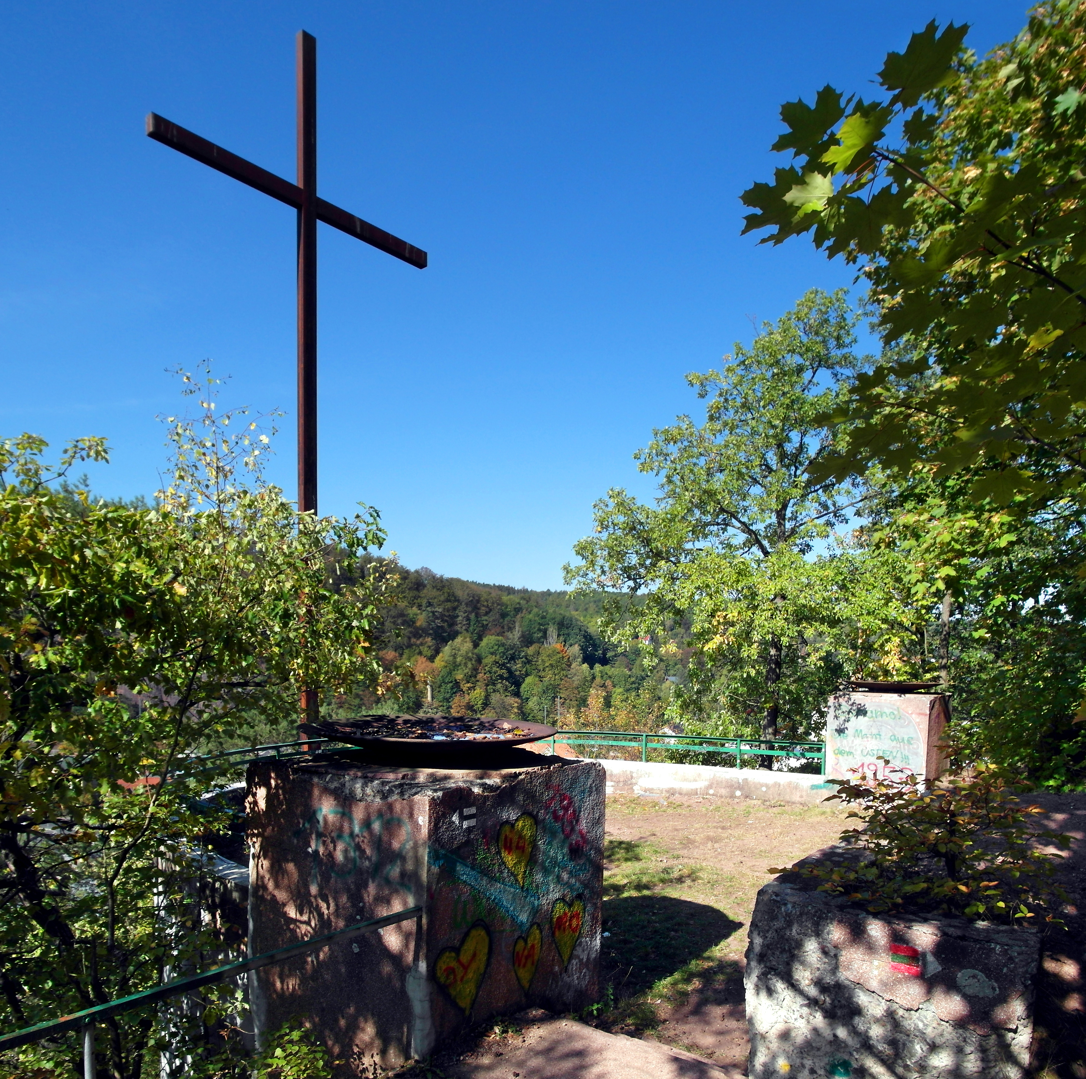 05.10.2018 01734 Rabenau: Quellenberg-Denkmal, Großkreuz (GMP: 50.981842,13.634261) am Quellenberg, flankiert von zwei eisernen Feuerschalen. Erbaut 1934 zum Gedenken an die Toten des I. Weltkrieges. Obwohl auf Rabenauer Flur, liegt es direkt oberhalb der Kirchstraße von Freital-Hainsberg. [SAM8091-8092.JPG]20181005205MDR.JPG(c)Blobelt